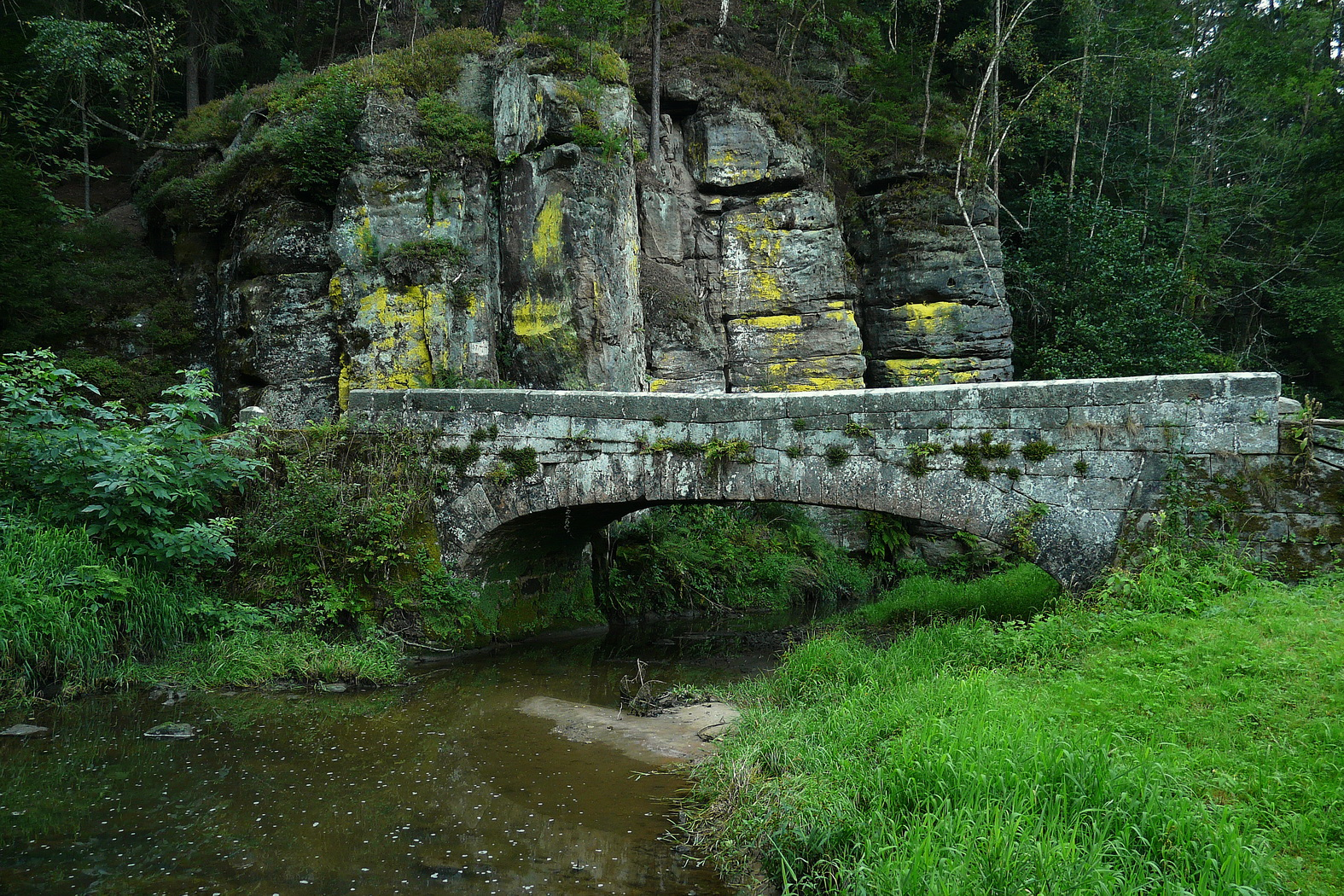 Podsemínský most přes Žehrovku